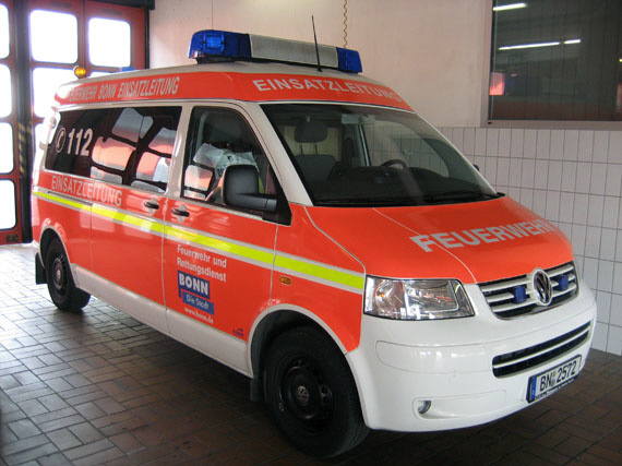 Einsatzfahrzeug des Fernmeldedienstes